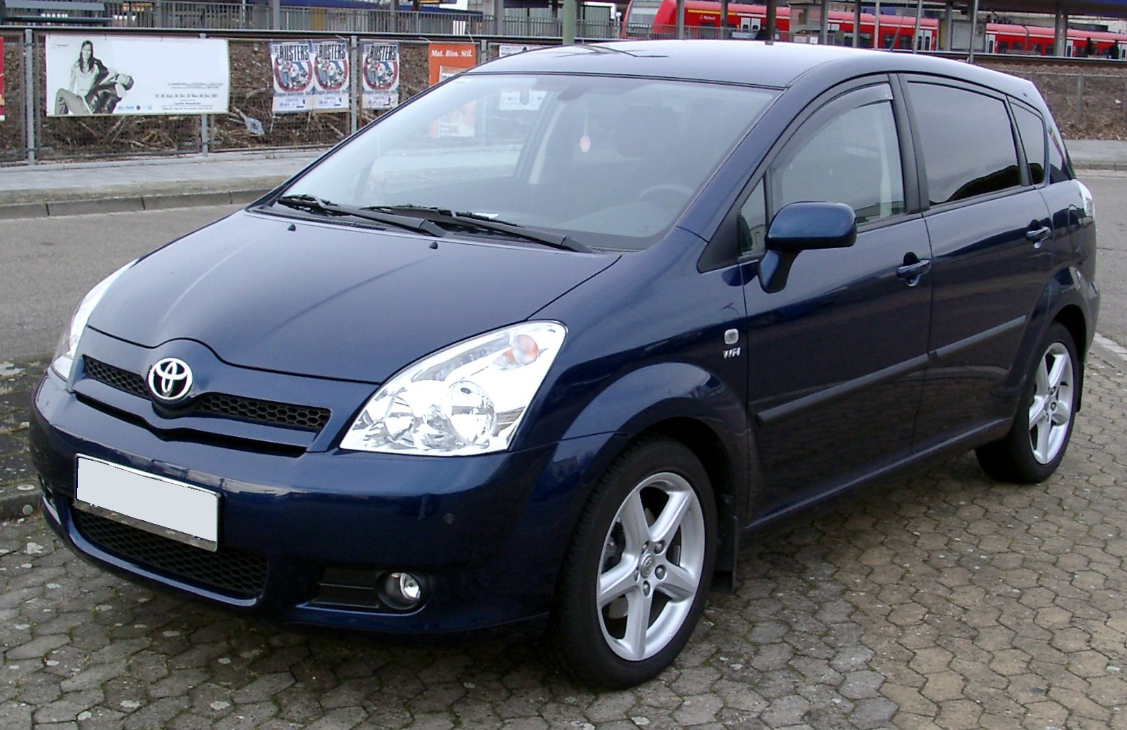 Toyota Corolla Verso